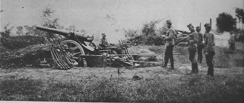 image extraite du journal "le Miroir".